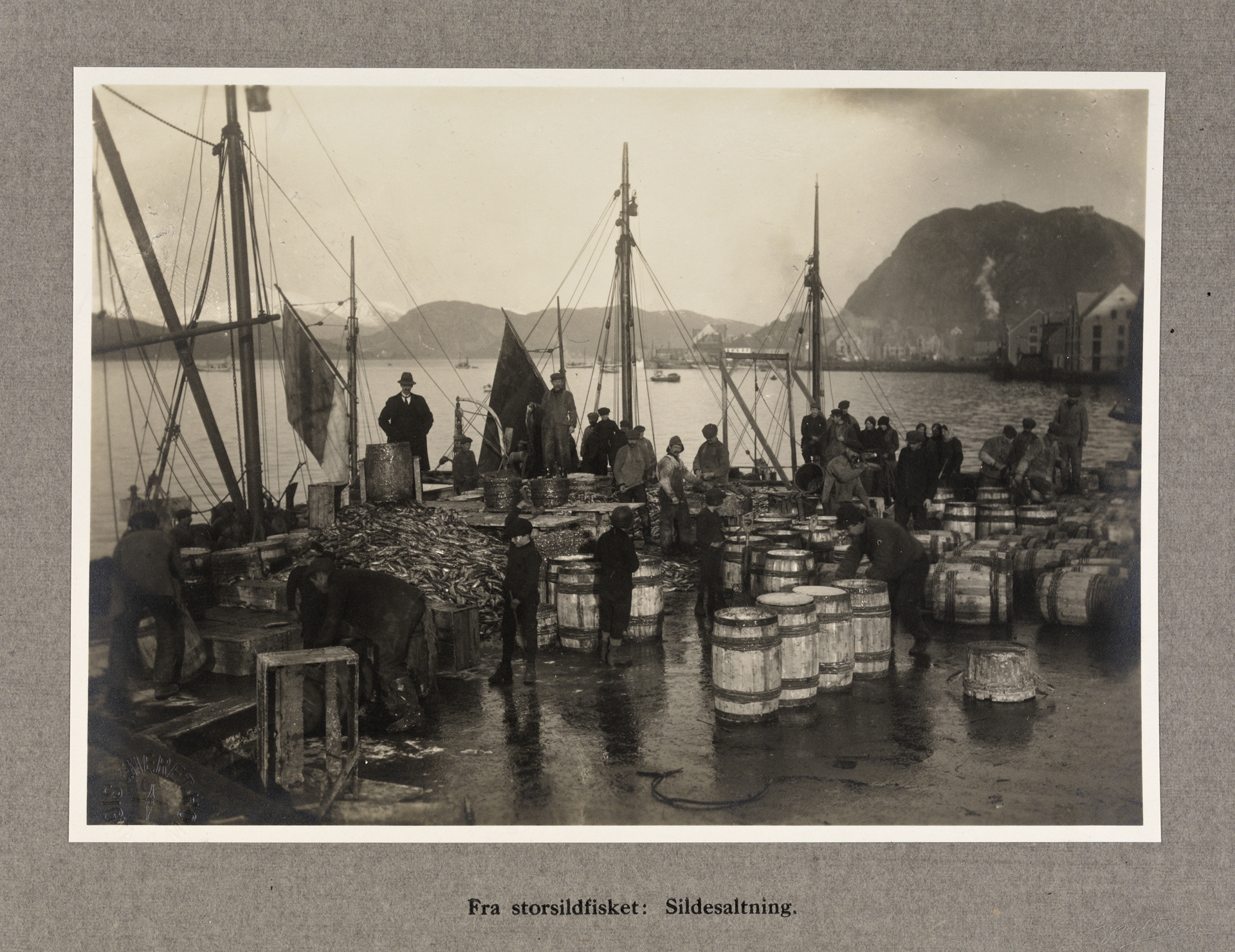 Tittel / Title: Fra storsildfisket: Sildesalting Motiv / Motif: Bildet står i albumet: "Stortingets Jernbanekomite's besøk i Aalesund 9-9-1920: Aalesund og Søndmøres næringsliv belyst ved tal og billeder". Salting of herring. Dato / Date: september 1920 Fotograf / Photographer: Sigvald Moa (1879-1938) Sted / Place: Møre og Romsdal, Ålesund Eier / Owner Institution: Nasjonalbiblioteket / National Library of Norway Lenke / Link: Bildesignatur / Image Number: bldsa_FAalb008_067